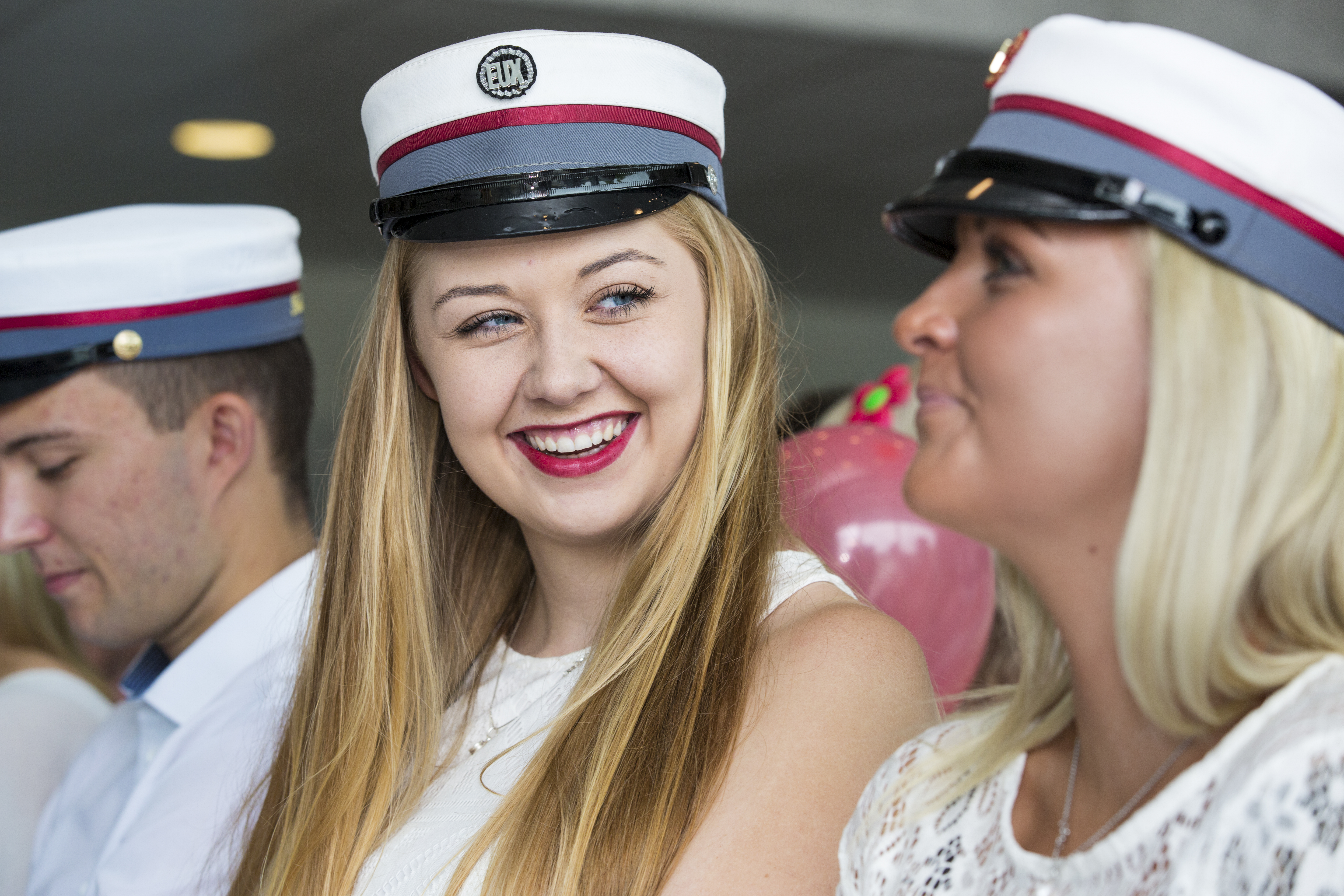 EUX studenter får studenterhue på Knord